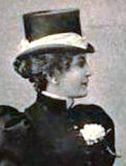 Nagy Ibolya magyar színésznő.